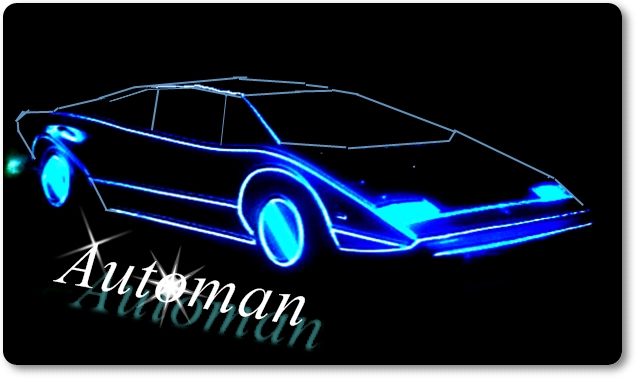 riproduzione dell'auto usata nel telefilm automan